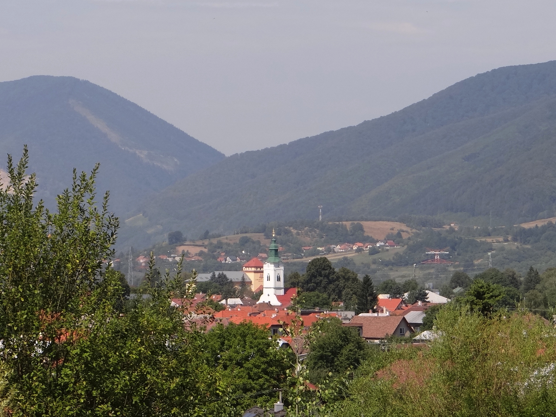 Sučany